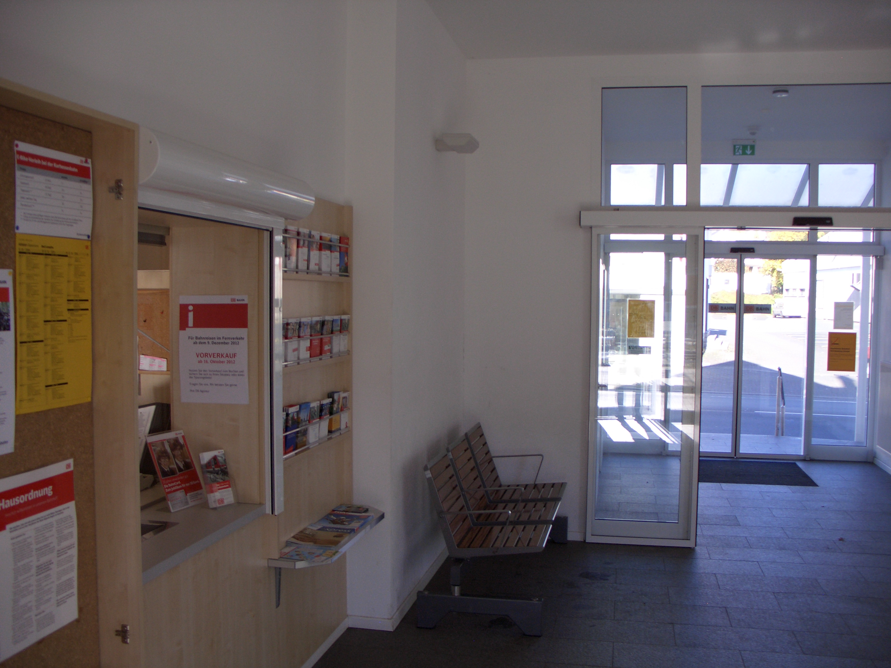 Die Wartehalle mit Fahrkartenschalter im Oktober 2012. Links ist der Ausgang zur Straße zu sehen.